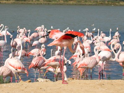 Flamant rose